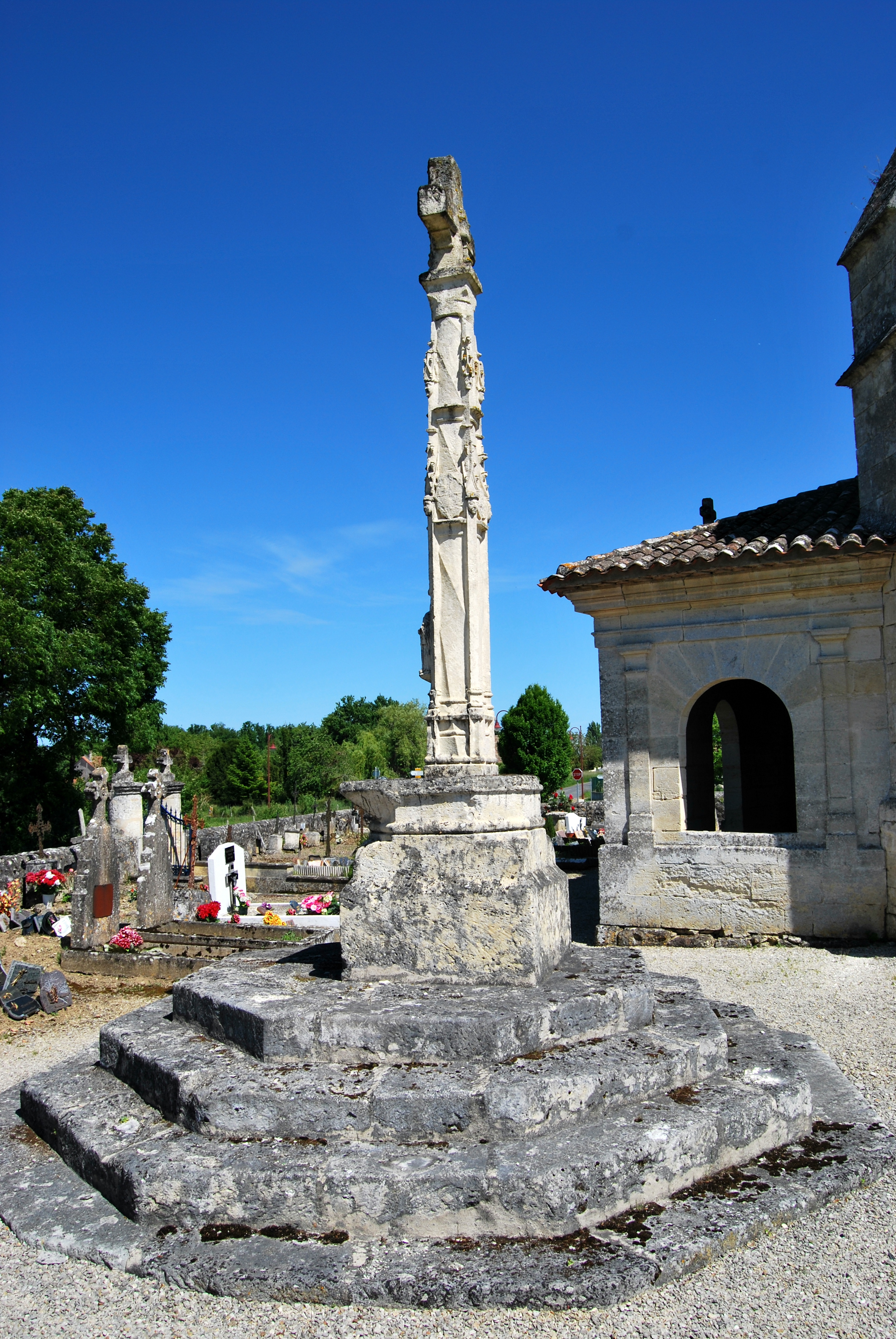 Croix de cimetière de Blésignac